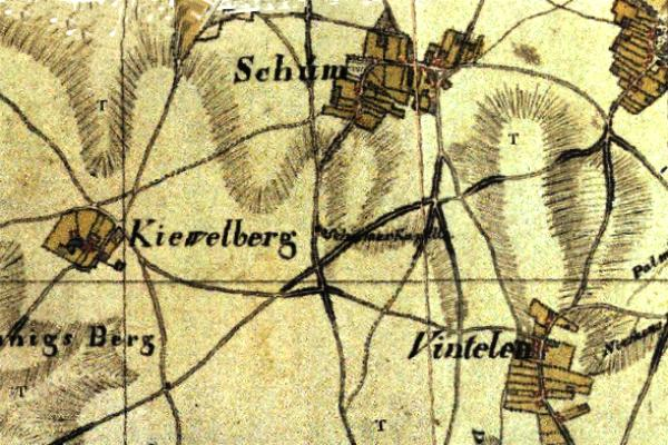 Kartenaufnahme der Rheinlande 1804/05